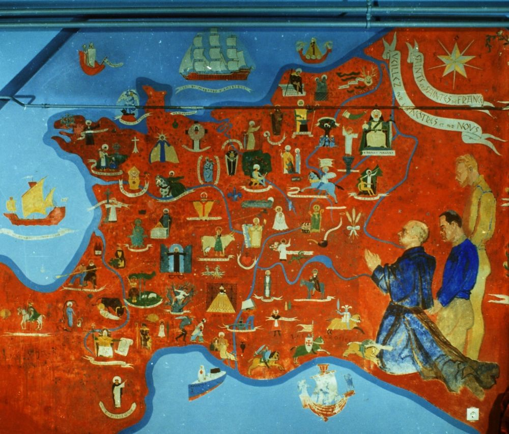 Innenansicht der französischen Kapelle/ Frankreichkarte mit Heiligenfiguren